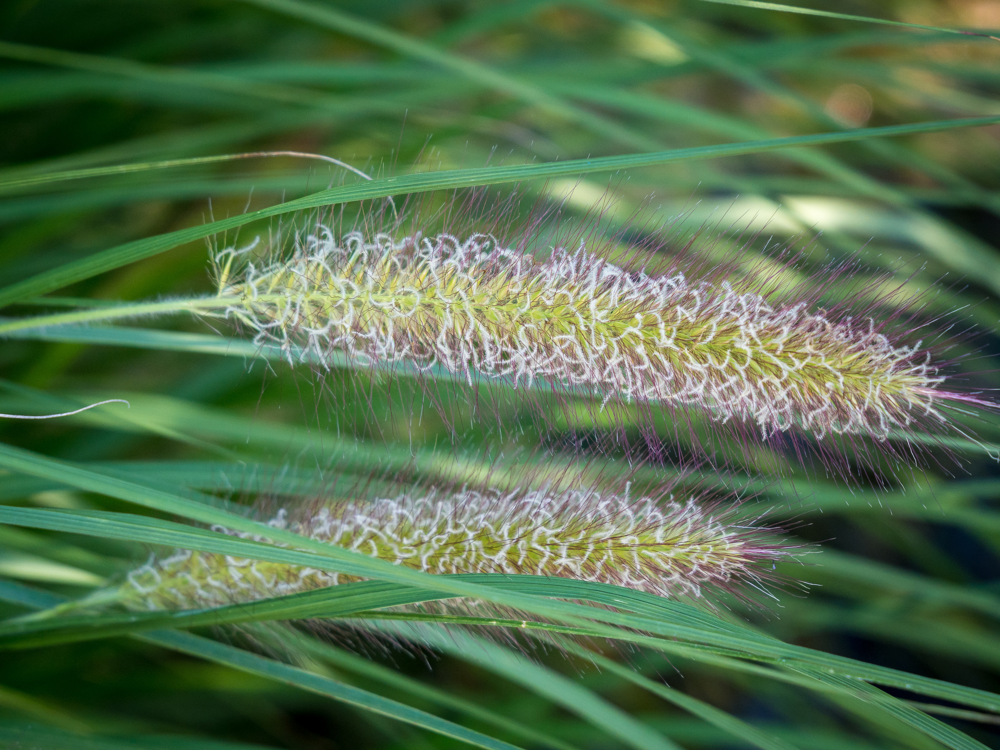 Das Lampenputzergras, lat. Pennisetum alopecuroides